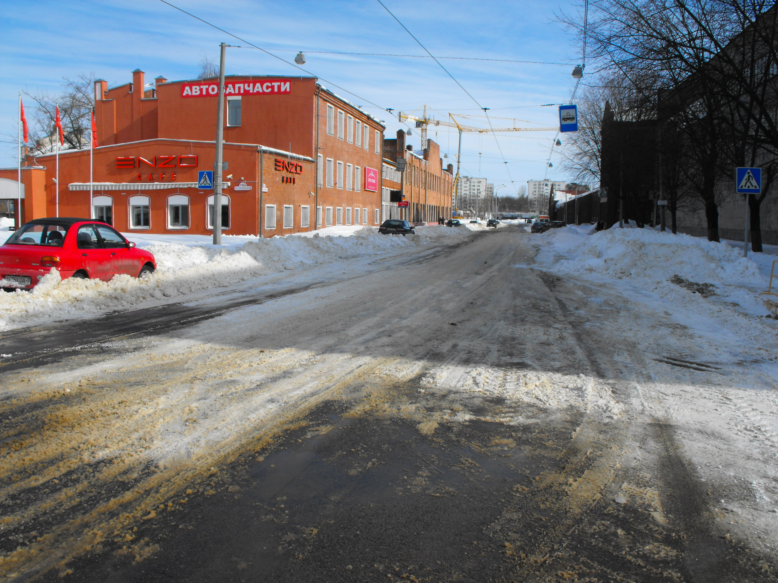 Минск, улица Октябрьская. Март 2013 года.